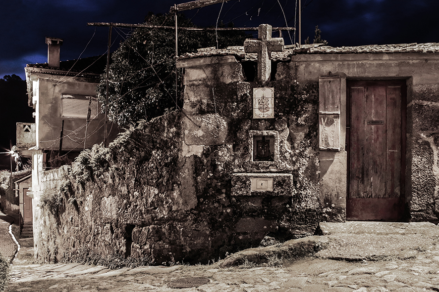 Alminhas e levada de água no centro da aldeia de Pias